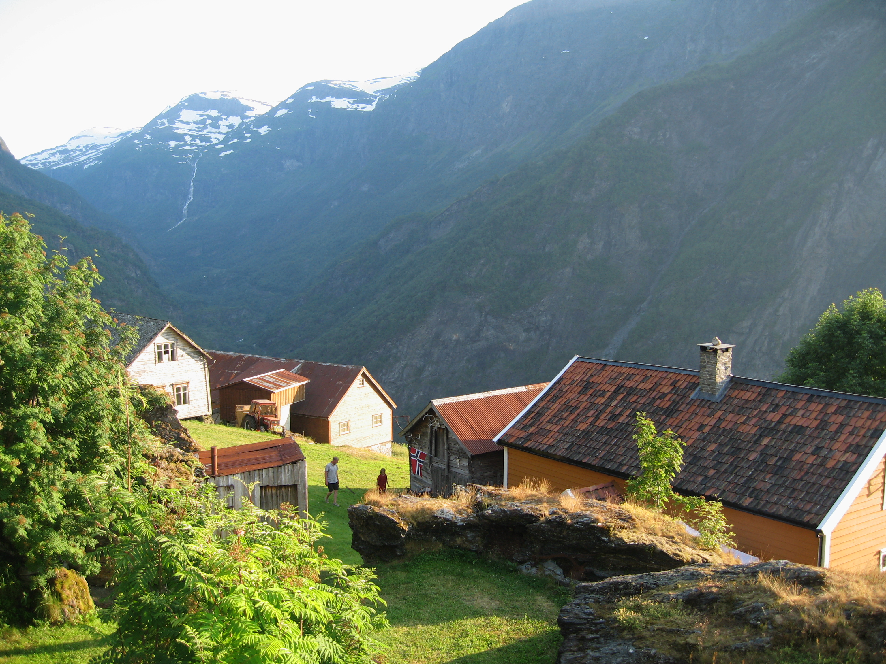 Oversiktsbilde over Holo Gardstun ,Flåm.